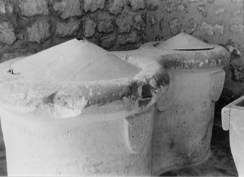 Taufbecken in der Saint-Martin in Courcoury